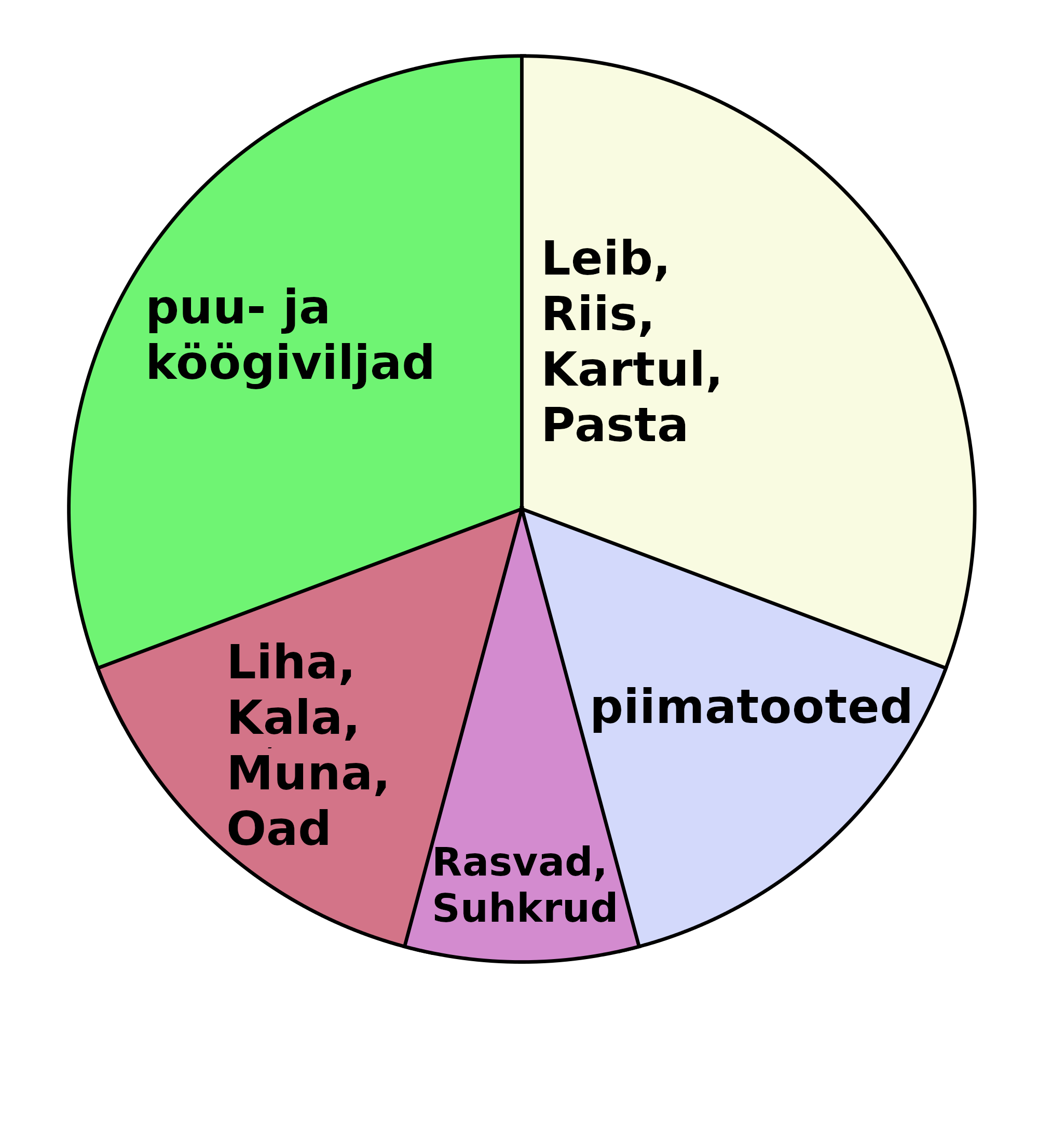 Eatwell Plate.svg